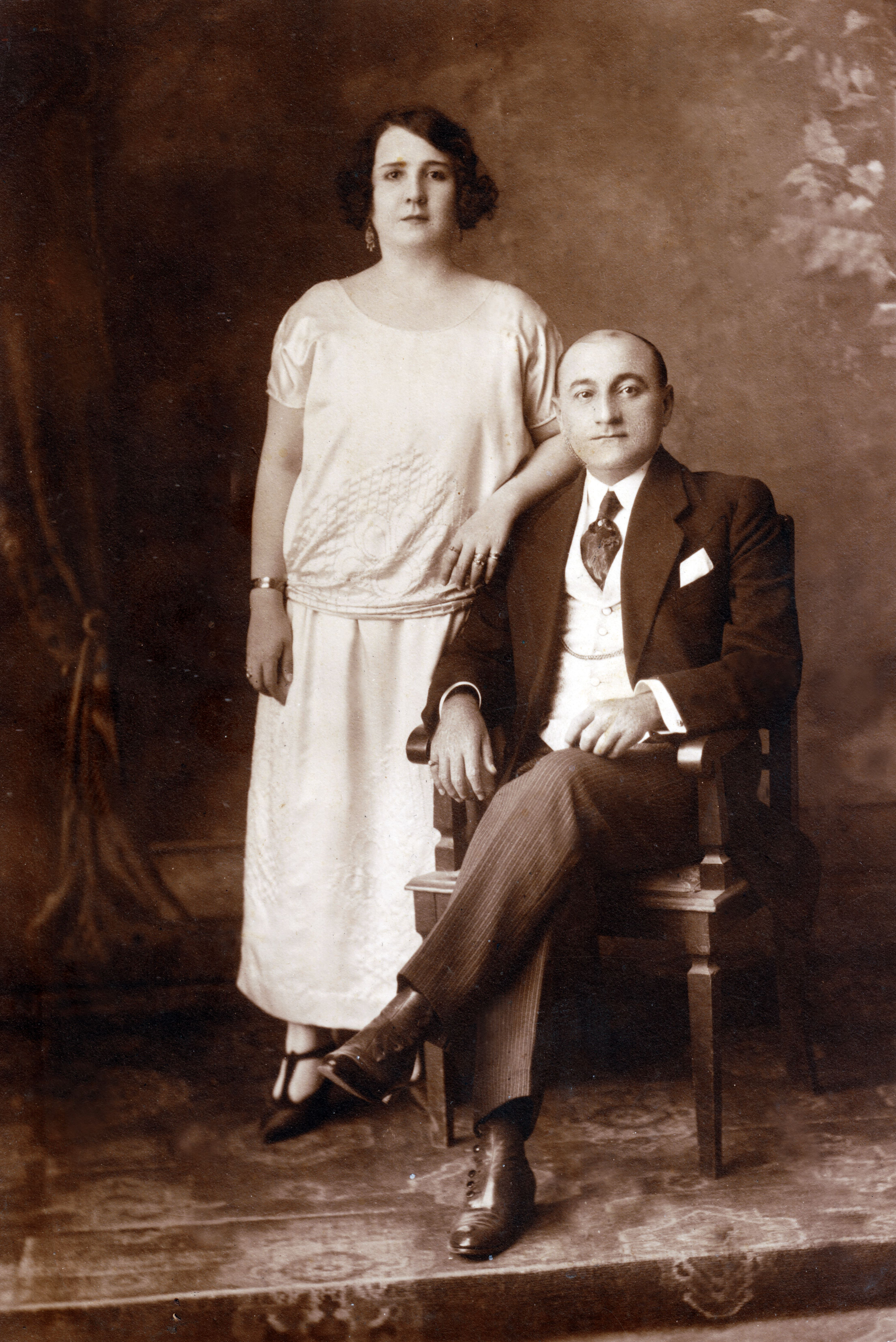 María Eva Rodríguez Rivero y su esposo Tomás Liscano Giménez.